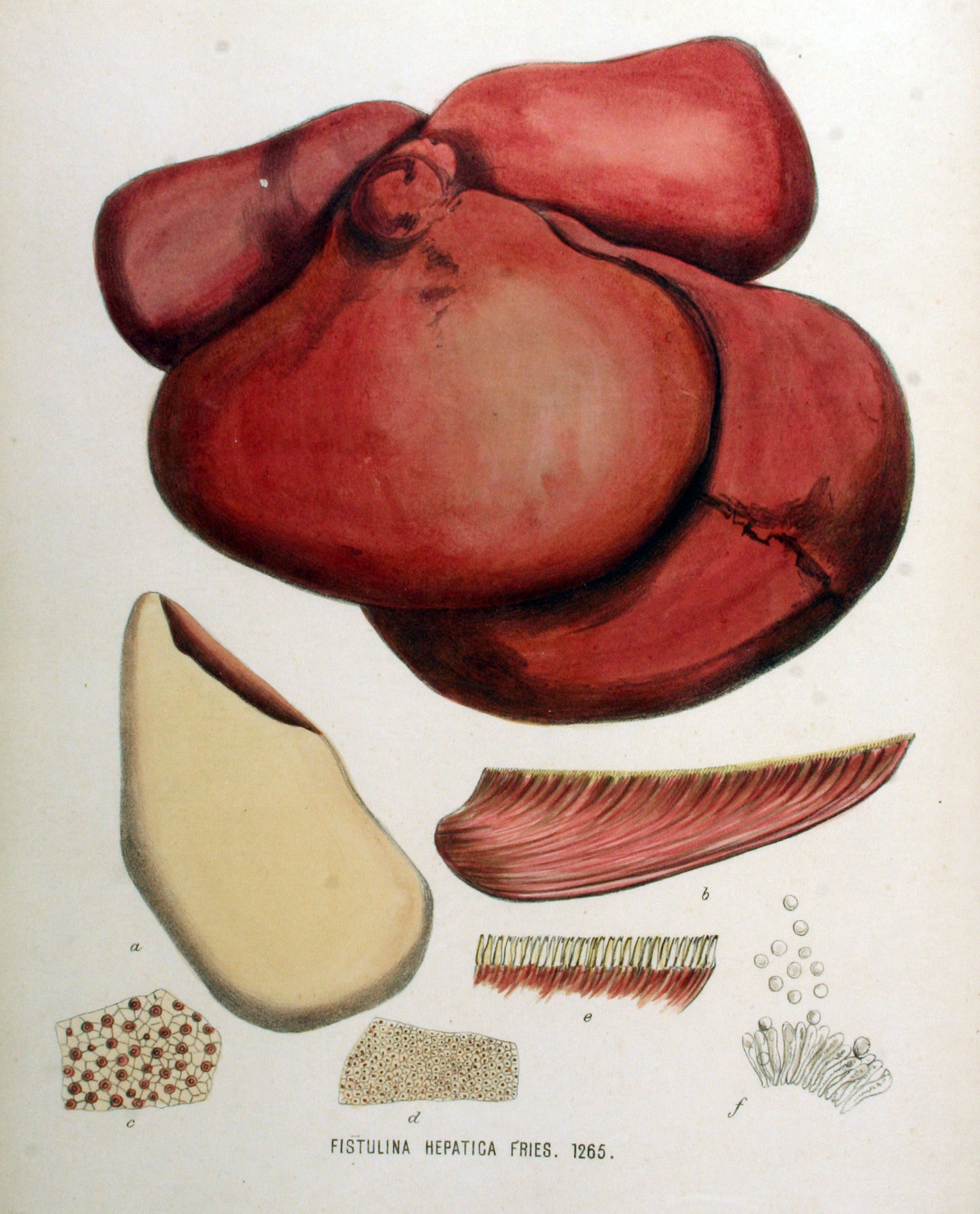 Fistulina hepatica (Schaeffer) Withering 1792